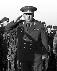 Mukhtar Altynbayev, Kazakhstani minister of defense